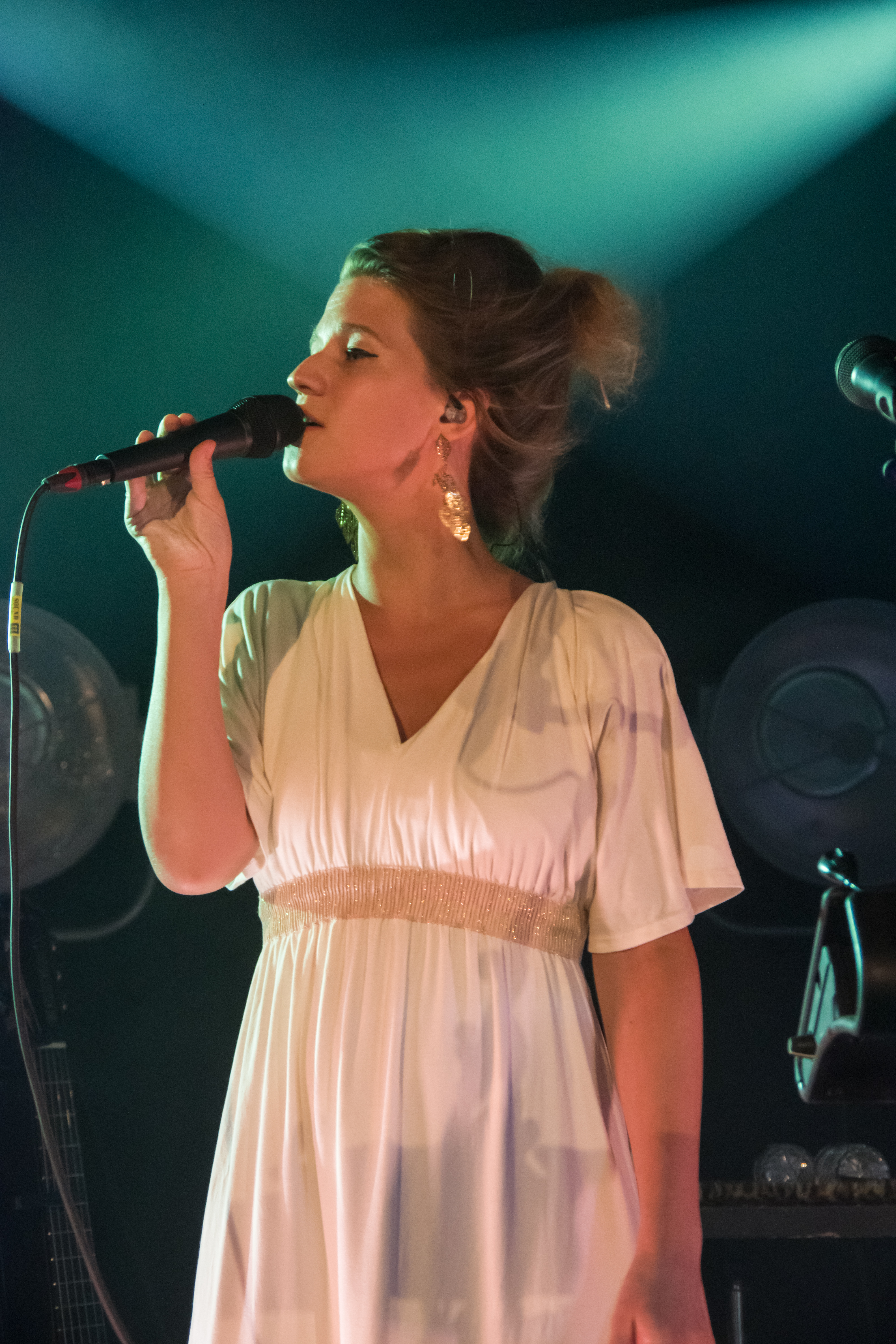 Das Zelt-Musik-Festival 2018 in Freiburg im Breisgau 26.07.2018 Selah Sue